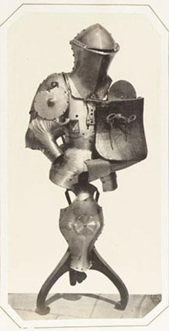 Armour / Rüstung Herzog von Ferrara und Modena (+ 4 others; 5 works, some lrgr) Alfons II von Este.